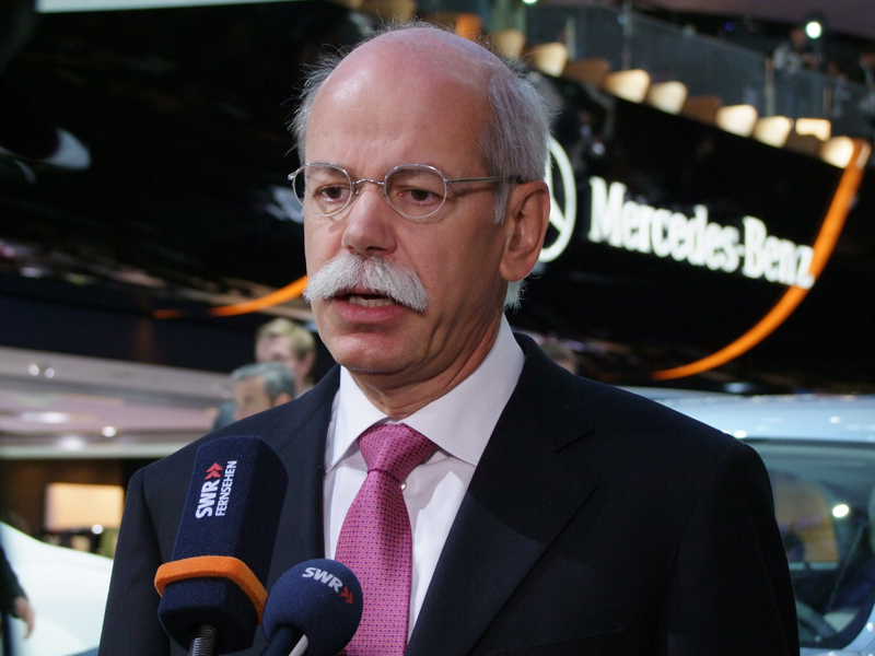 Dieter Zetsche während eines Interviews auf der IAA 2009